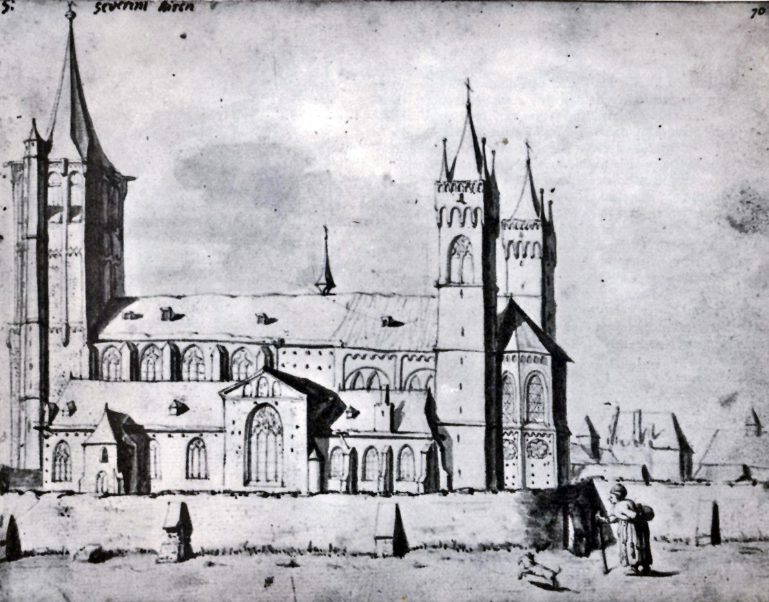 St. Severin von Süden, im Vordergrund die Immunitätsmauer. Rechts die angrenzenden Stiftsgebäude. Justus Finkenbaum, Köln 17. Jahrhundert. Das Blatt ist benannt als „s. severini kirch“